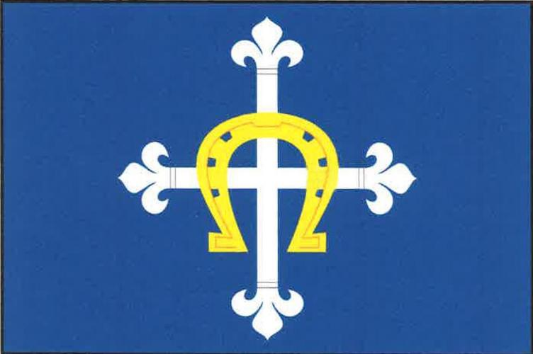 Čmelíny vlajka